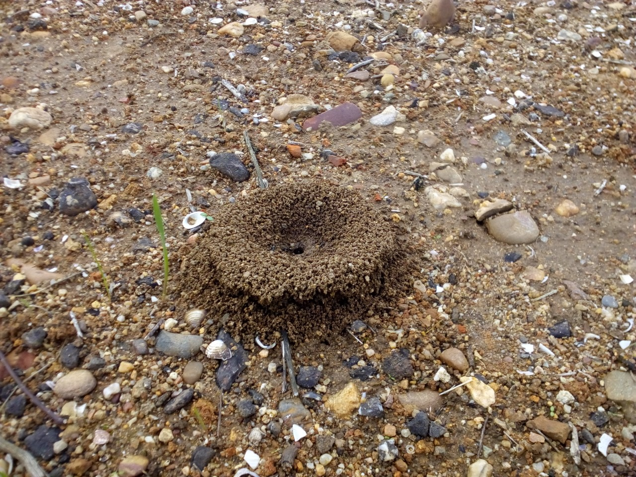 Formikejo